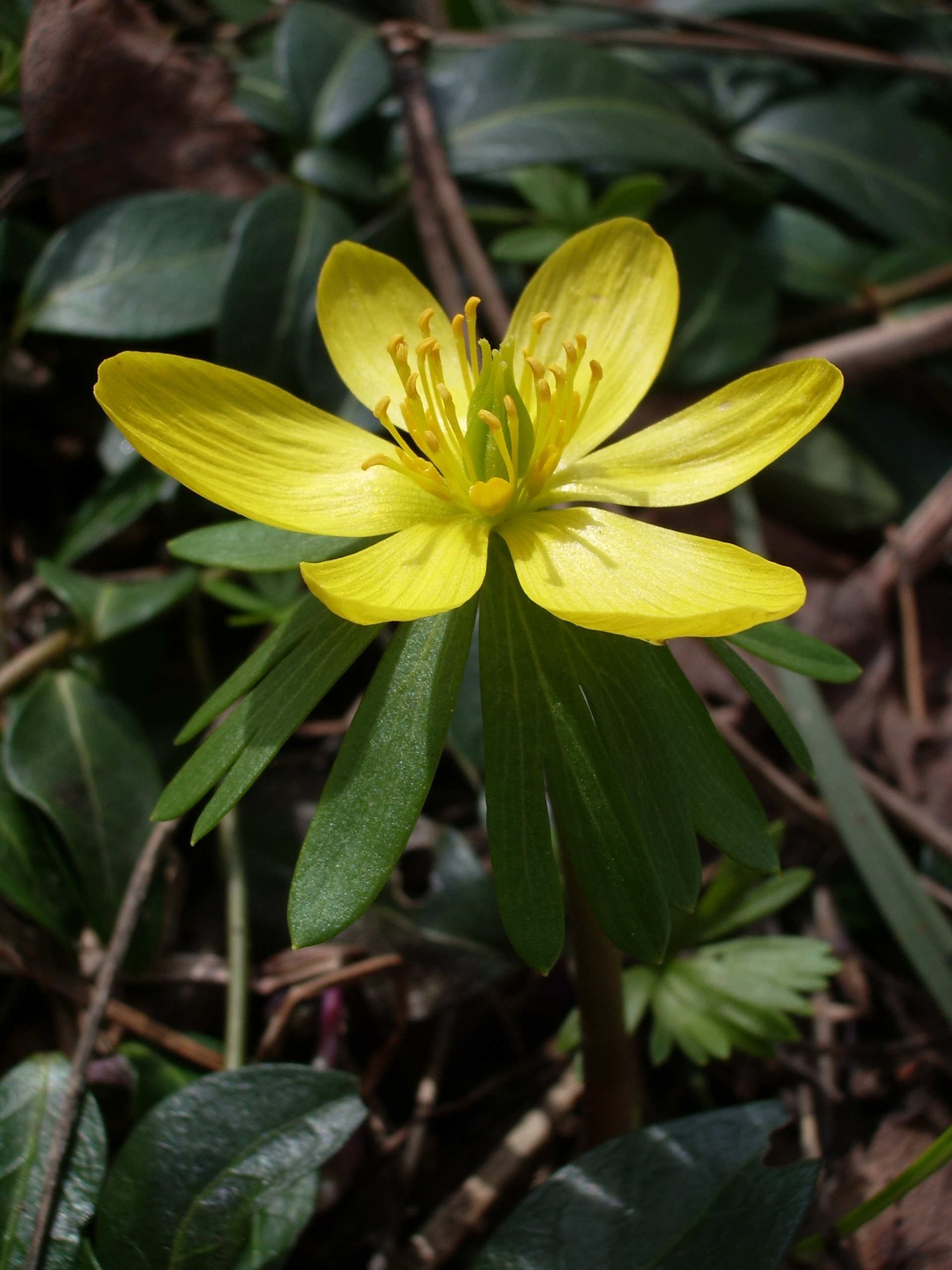 Blütenstand von Eranthis hyemalis (Winterling) aufgenommen im März 2006 in einem Garten in Bad Tölz